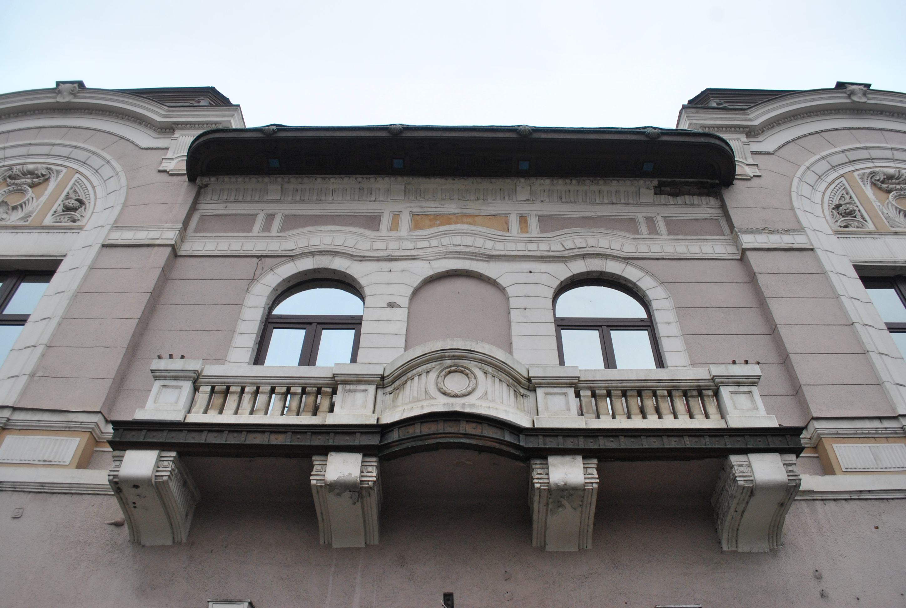 Fostul cazinou evreiesc, azi birouri